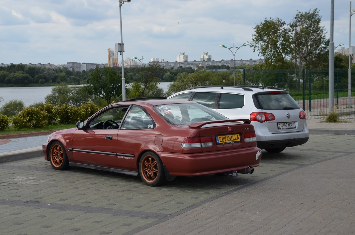 Honda Civic 1996 в цвете R95P